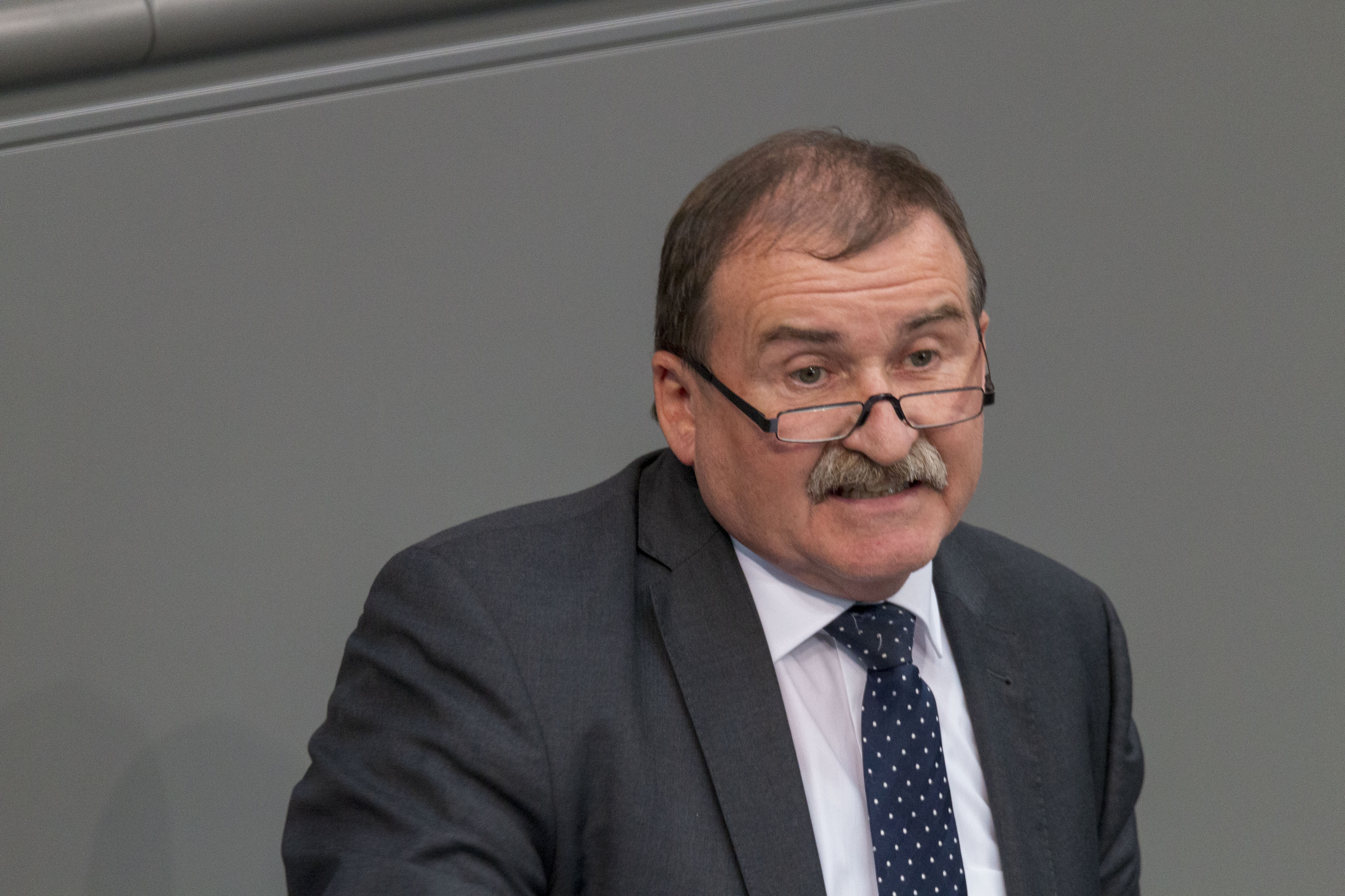 Max Straubinger, Bundestagsabgeordneter der CSU während der Plenarsitzung des Deutschen Bundestages am 2. Juli 2020 in Berlin.